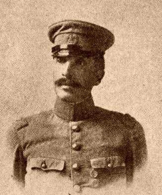 General de Brigada Felipe Ángeles